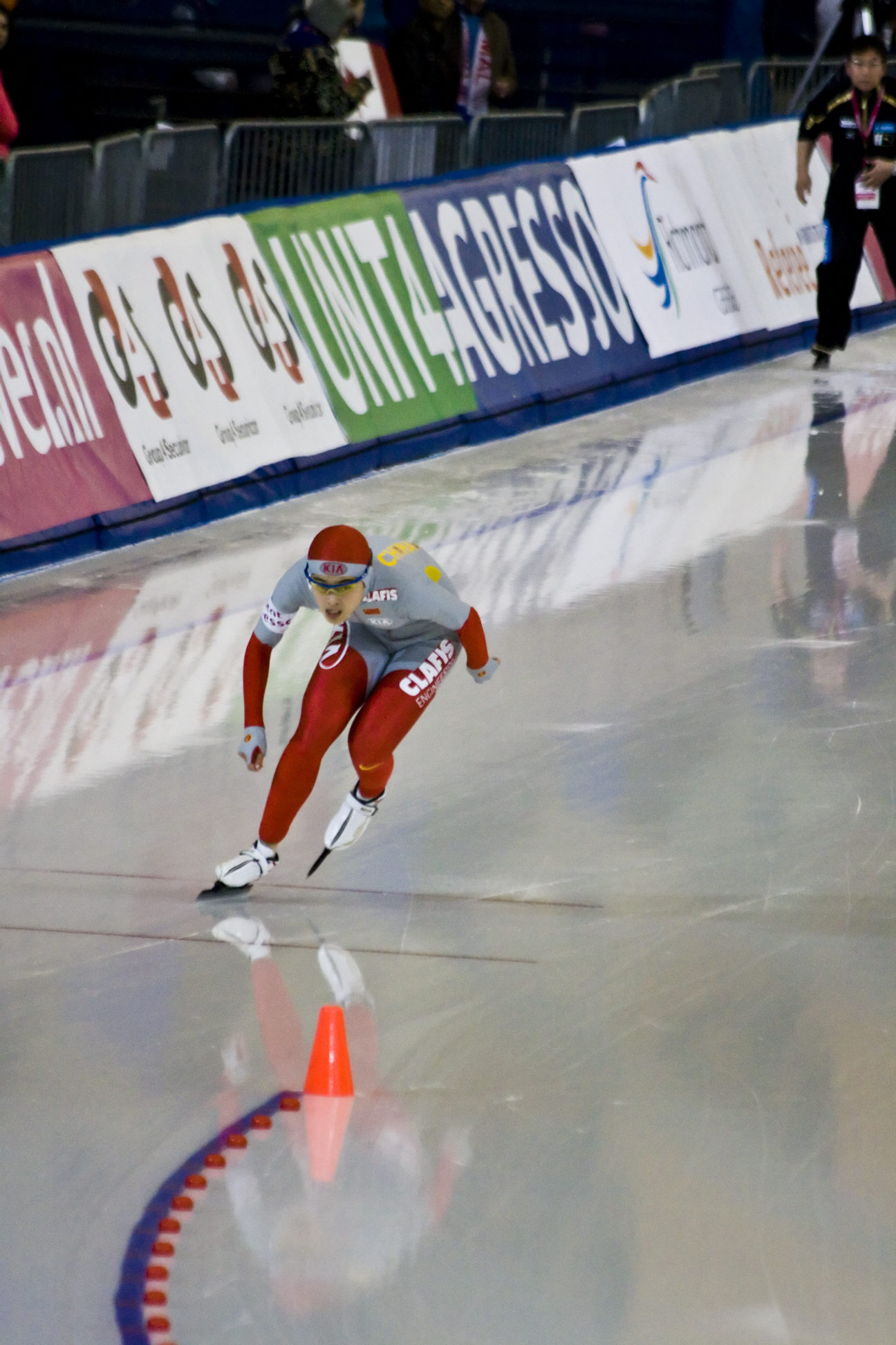 Yu Jing